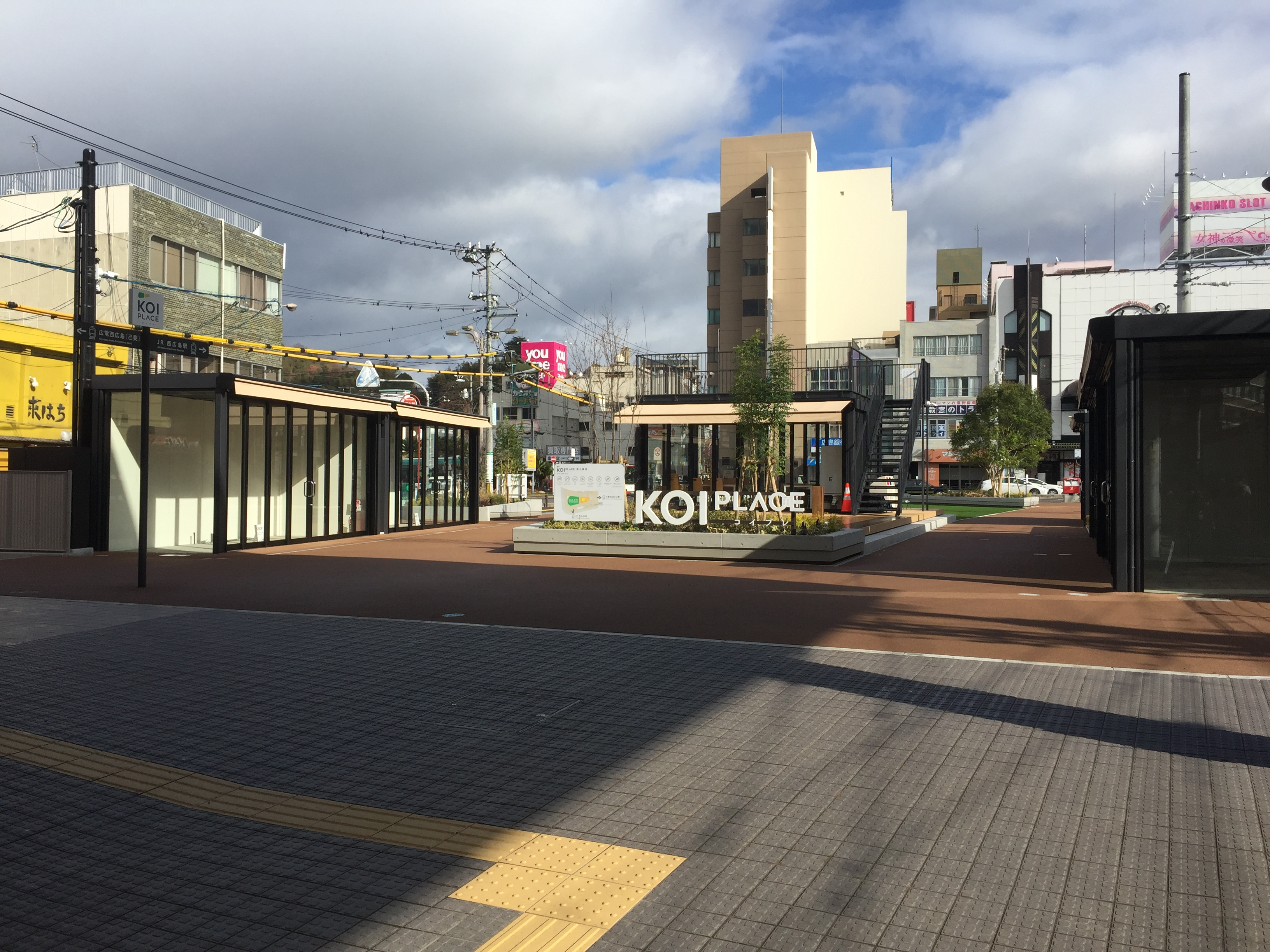 ひろでん会館跡地の暫定活用、KOI PLACEを広電駅側から撮影